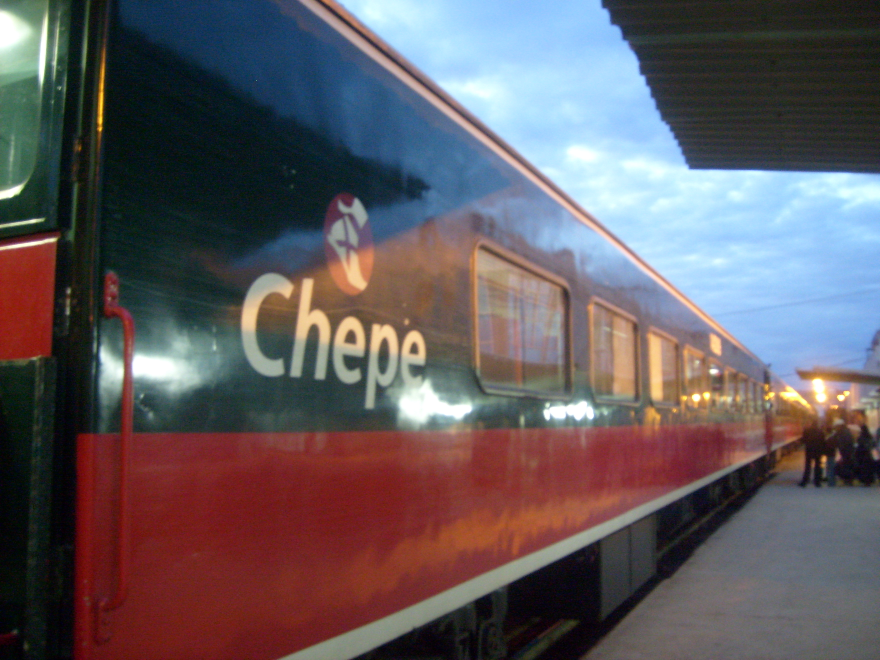 EN LA MAÑANA SALE EL TREN A LAS 7:00